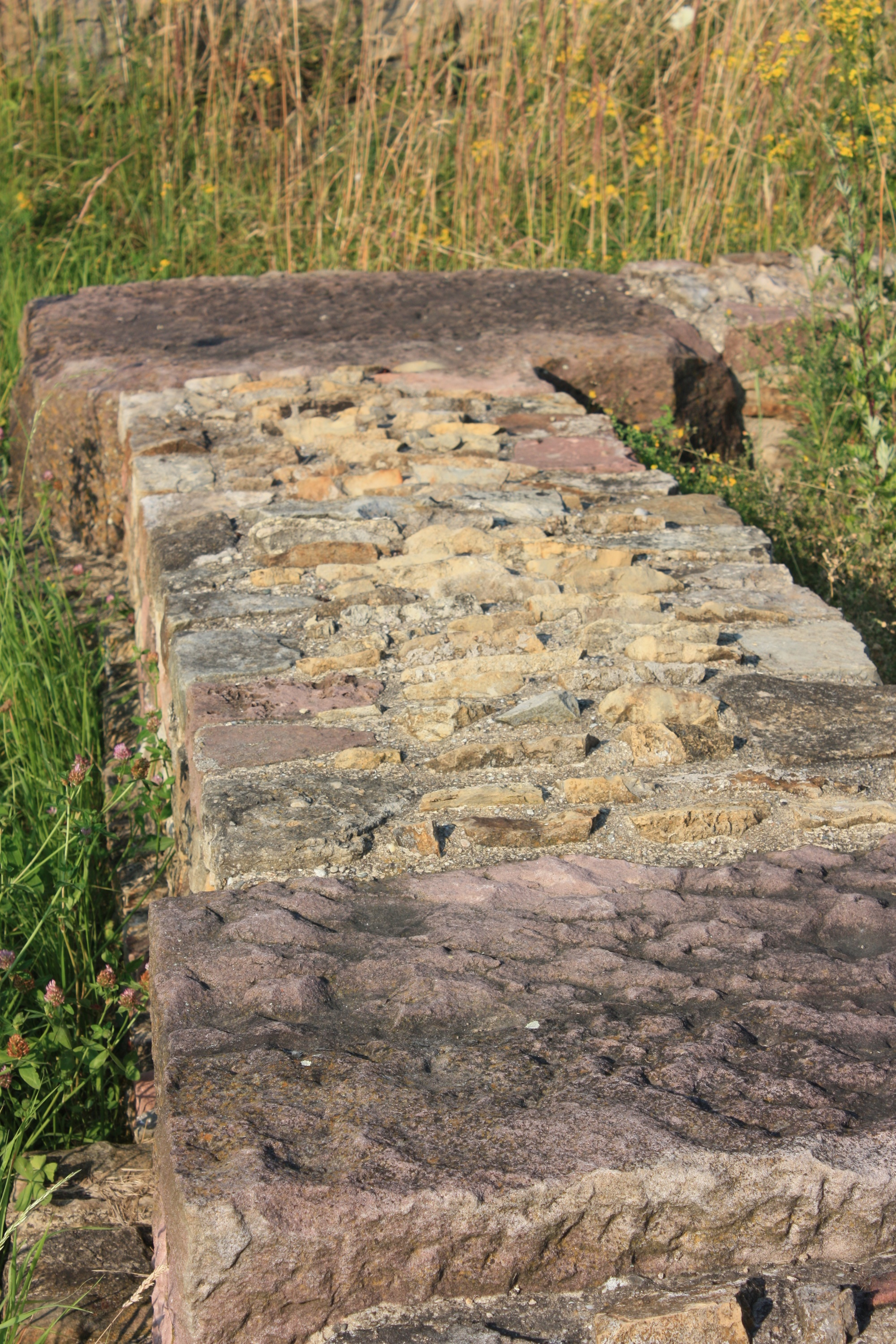 Walldorf, Baden-Württemberg: Reste einer römischen Domäne (Villa Rusticsa)